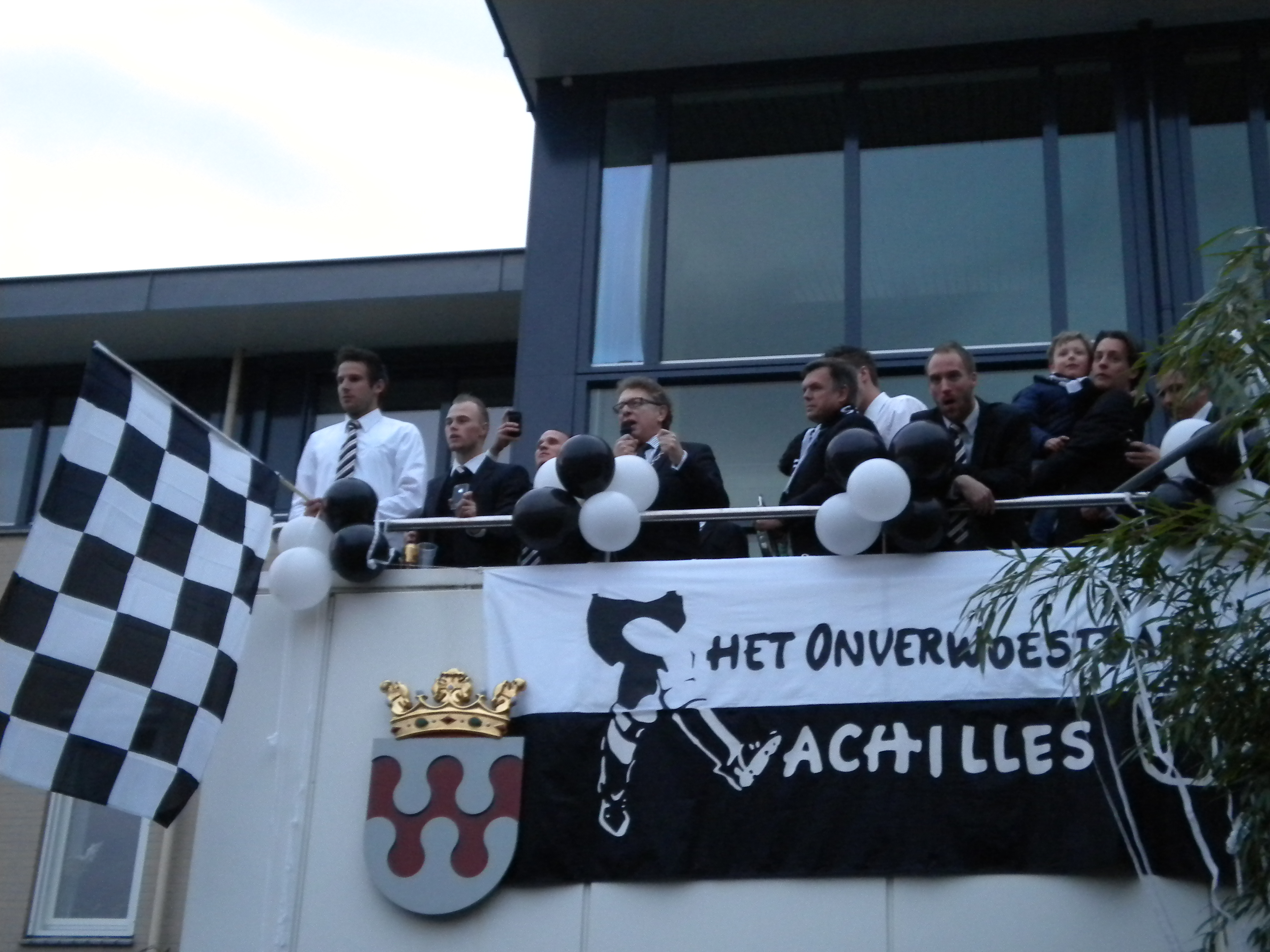 De huldiging van Achilles '29 op het gemeentehuis van Groesbeek na het behalen van landskampioenschap in 2013. Van links naar rechts Daniël van Straaten, Mark Roebbers, Michael Lanting (achter), burgemeester Harry Keereweer, voorzitter Harrie Derks, Tim Sanders (achter), Dominique Scholten, Ivo Rigter (met kind) en teammanager Stefan Kersten.